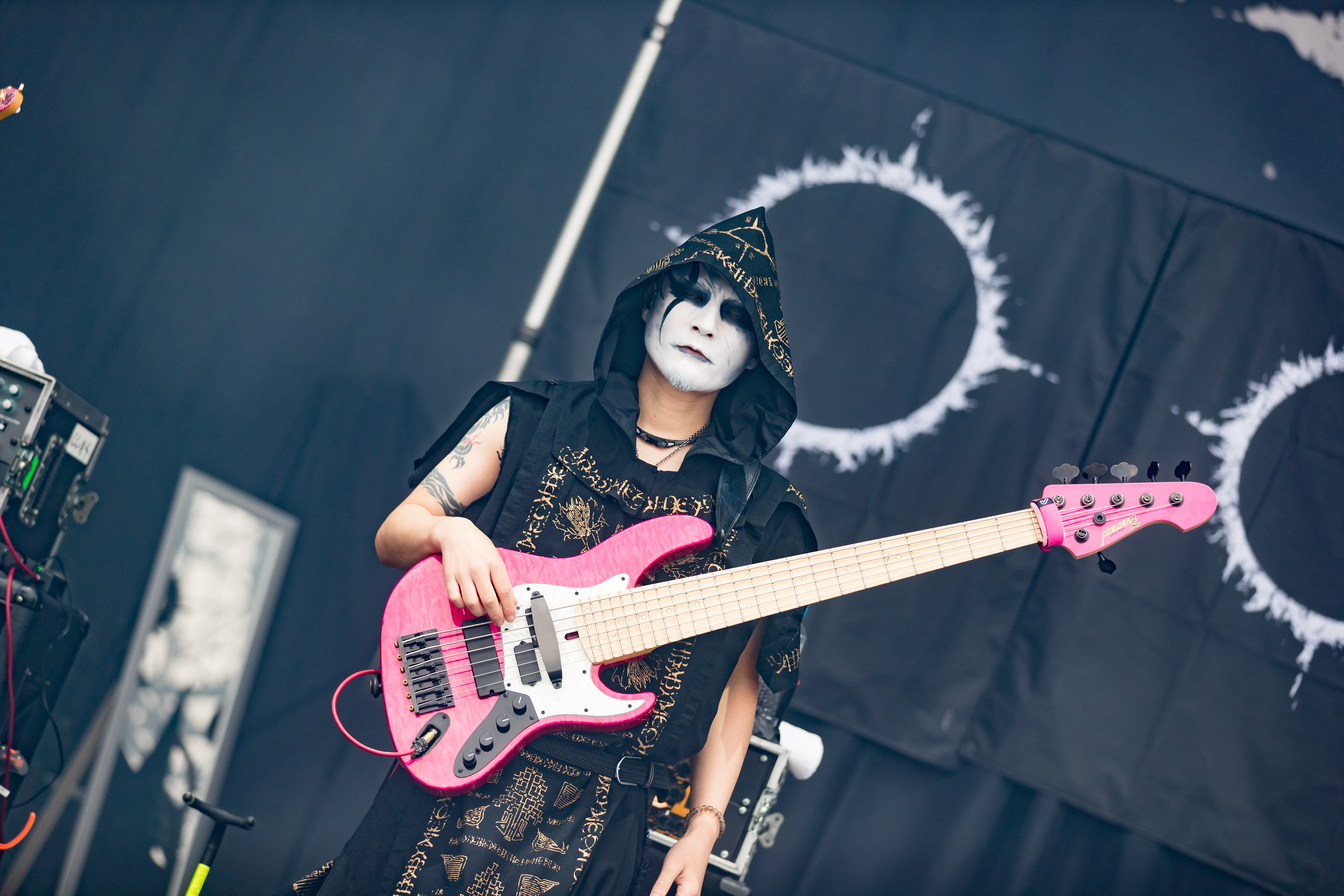 Babymetal @ Rock am Ring 2018